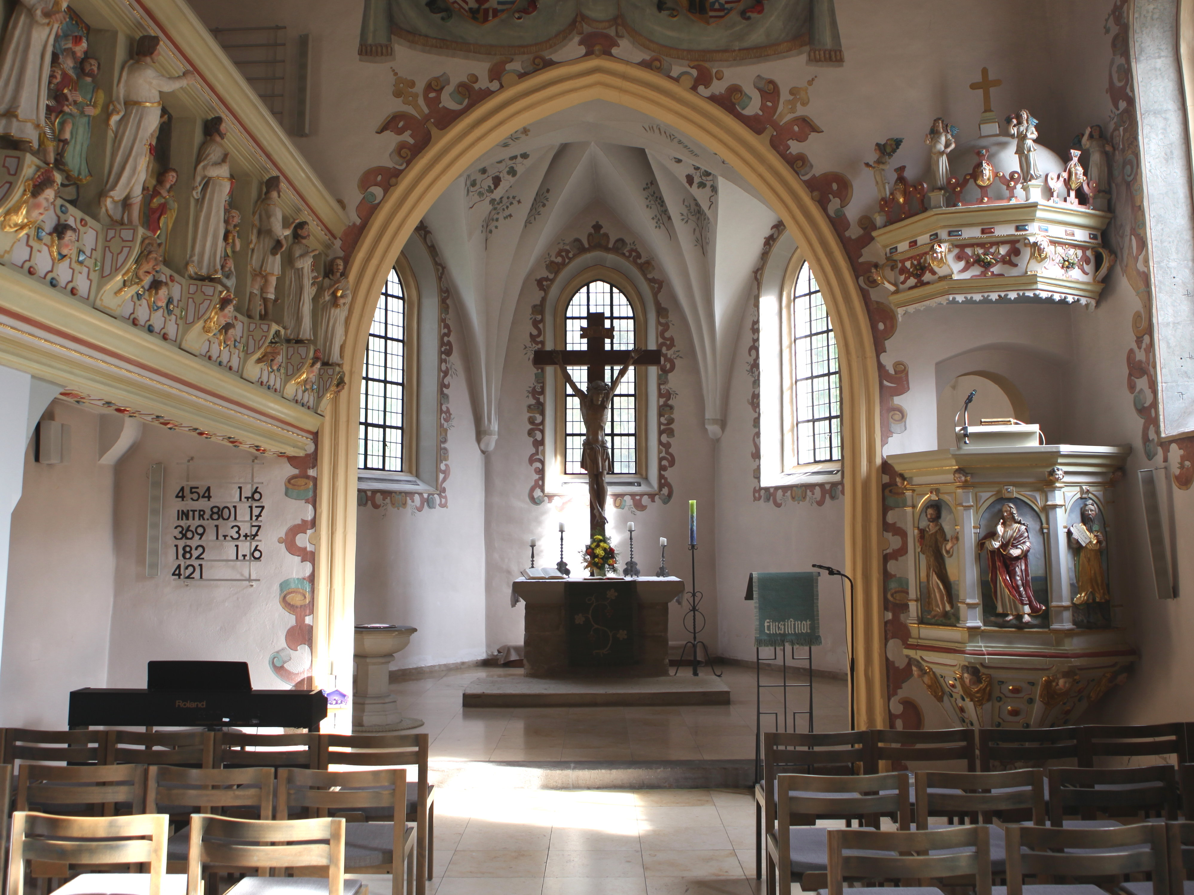 Evangelische Pfarrkirche St. Johannis in Rödental, OT Oeslau, Landkreis Coburg